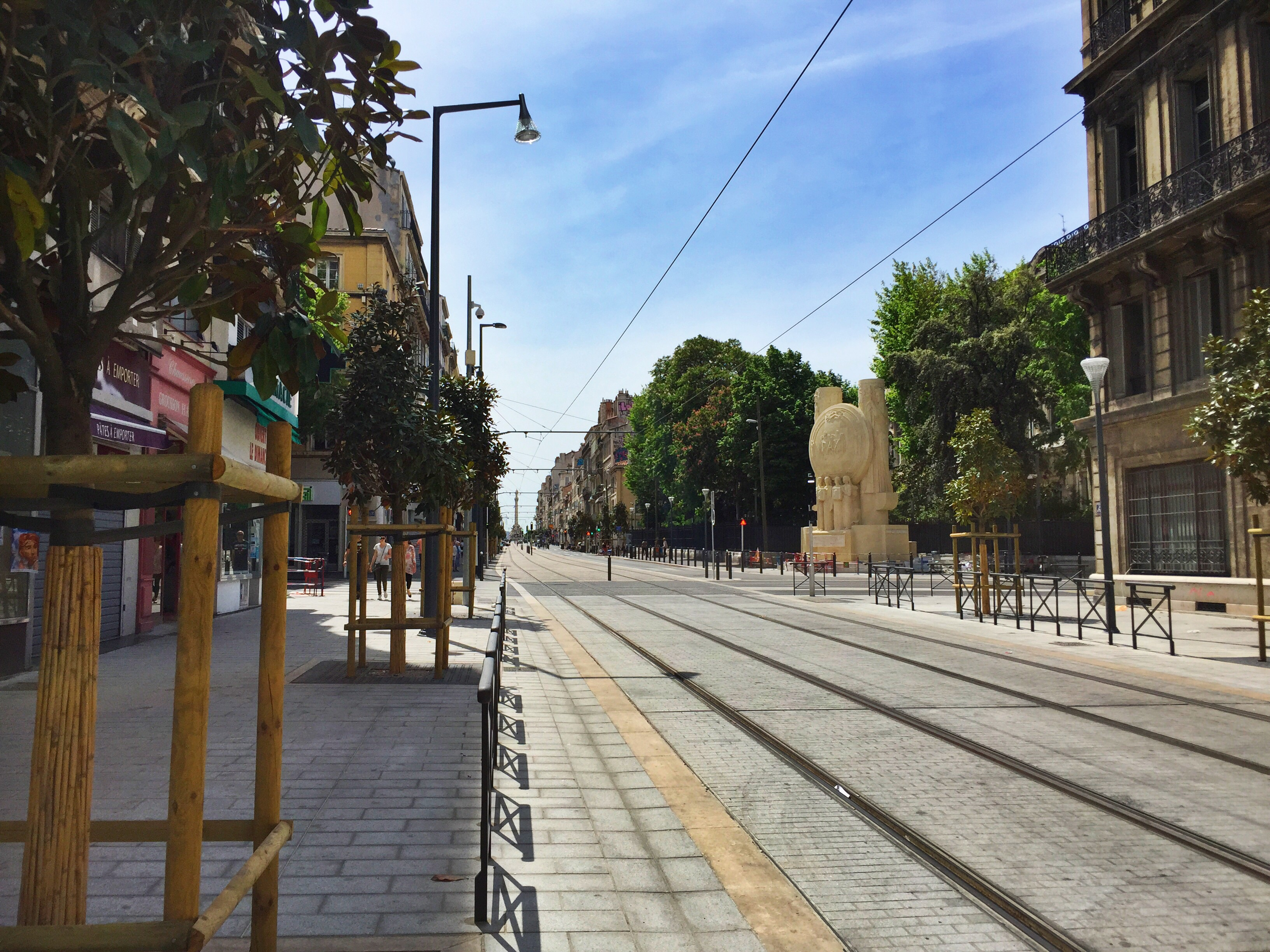 La rue de Rome réhabilitée en 2015 (Marseille, France)